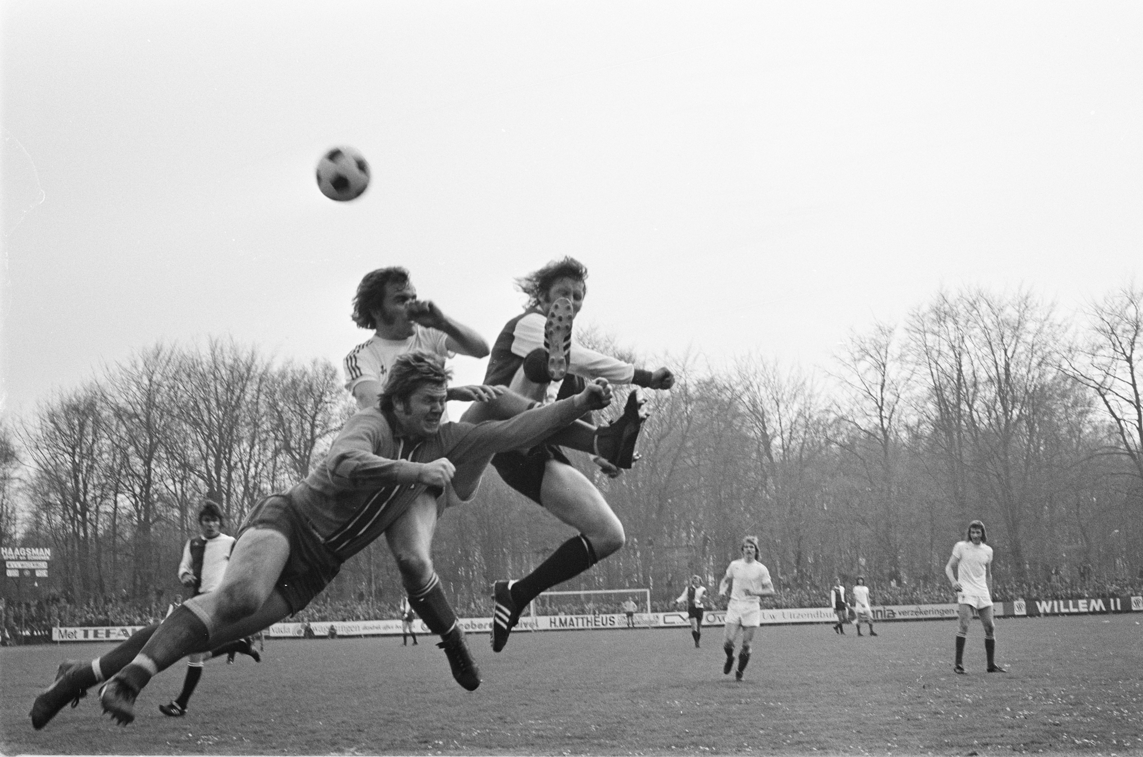 Collectie / Archief : Fotocollectie Anefo Reportage / Serie : Wageningen-Feyenoord 1-4 Beschrijving : Wim Jansen (Feyenoord) in duel met keeper Bert van Geffen (Wageningen) Datum : 27 april 1975 Locatie : Gelderland, Wageningen Trefwoorden : sport, voetbal, wedstrijden Persoonsnaam : Geffen, Bert van, Jansen, Wim Fotograaf : Mieremet, Rob / Anefo Auteursrechthebbende : Nationaal Archief Materiaalsoort : Negatief (zwart/wit) Nummer archiefinventaris : bekijk toegang 2.24.01.05 Bestanddeelnummer : 927-8954